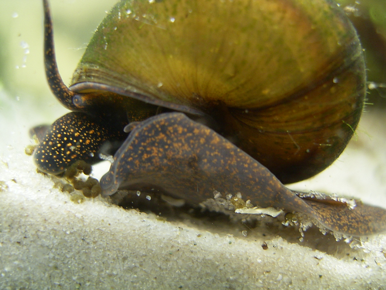 Viviparus viviparus, vaak moerasslak hier gezien in aquarium, vandaar de zandbodem.